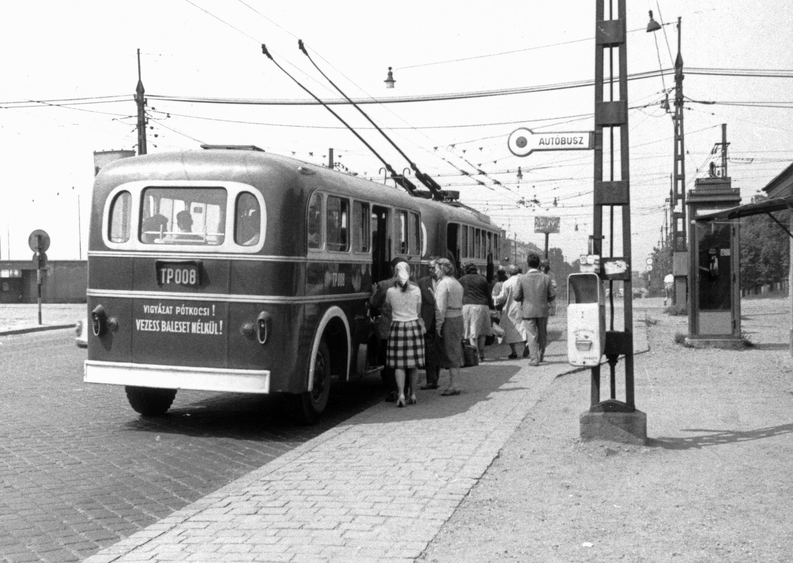 Hungária körút a Salgótarjáni úti kereszteződésnél, balra az út túloldalán, az MTK pálya látszik. Location: Hungary, Budapest VIII. Tags: telephone, trolley bus, Ikarus-brand, Hungarian brand, trailer, Budapest, ÁMG-brand Title: Hungária körút a Salgótarjáni úti kereszteződésnél, balra az út túloldalán, az MTK pálya látszik.